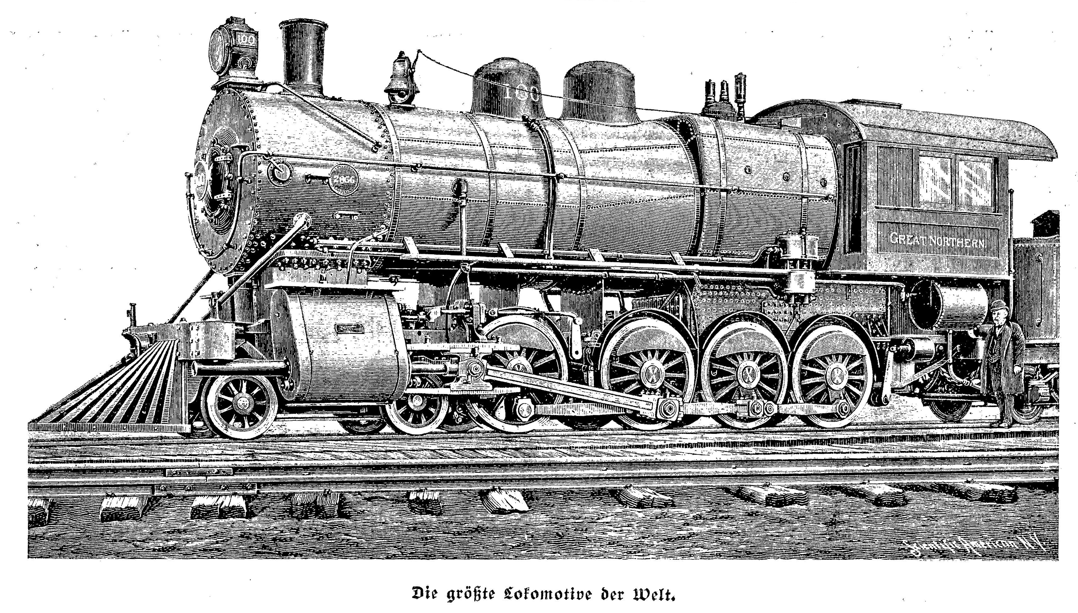 Brooks Locomotive Works: Locomotive for Great Northern Railway (1899)